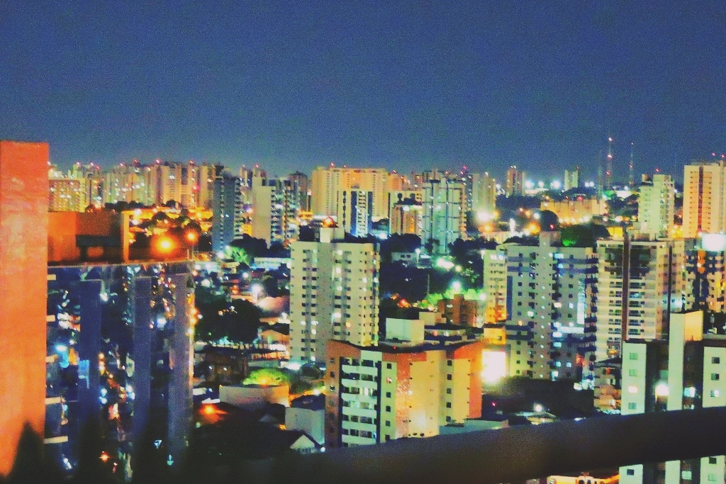 Zona Centro-Sul de Manaus, Brasil.